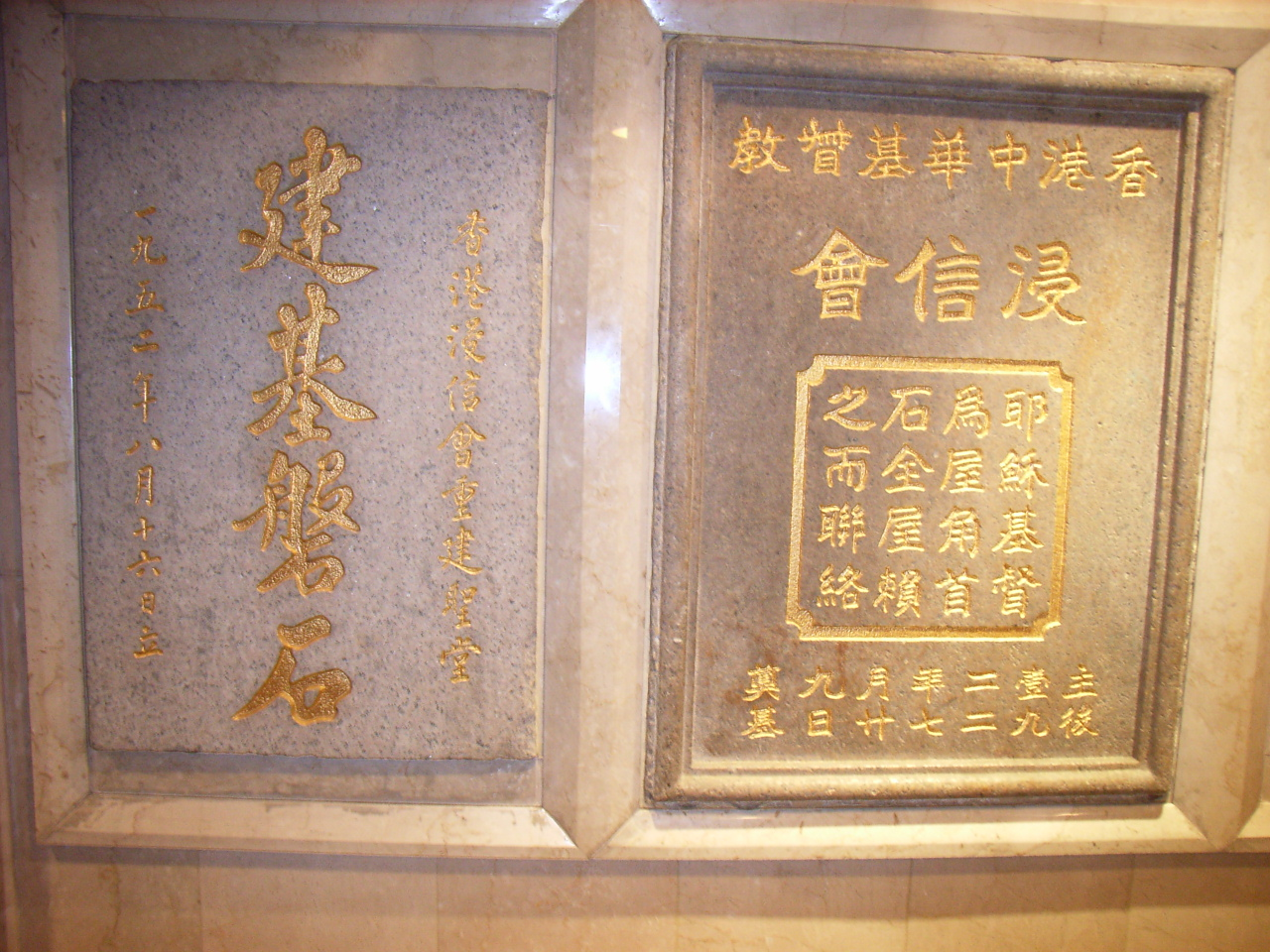 中文（香港）: 香港浸信會聯會, 堅道50號, 半山區, Caine Road, Hong Kong.